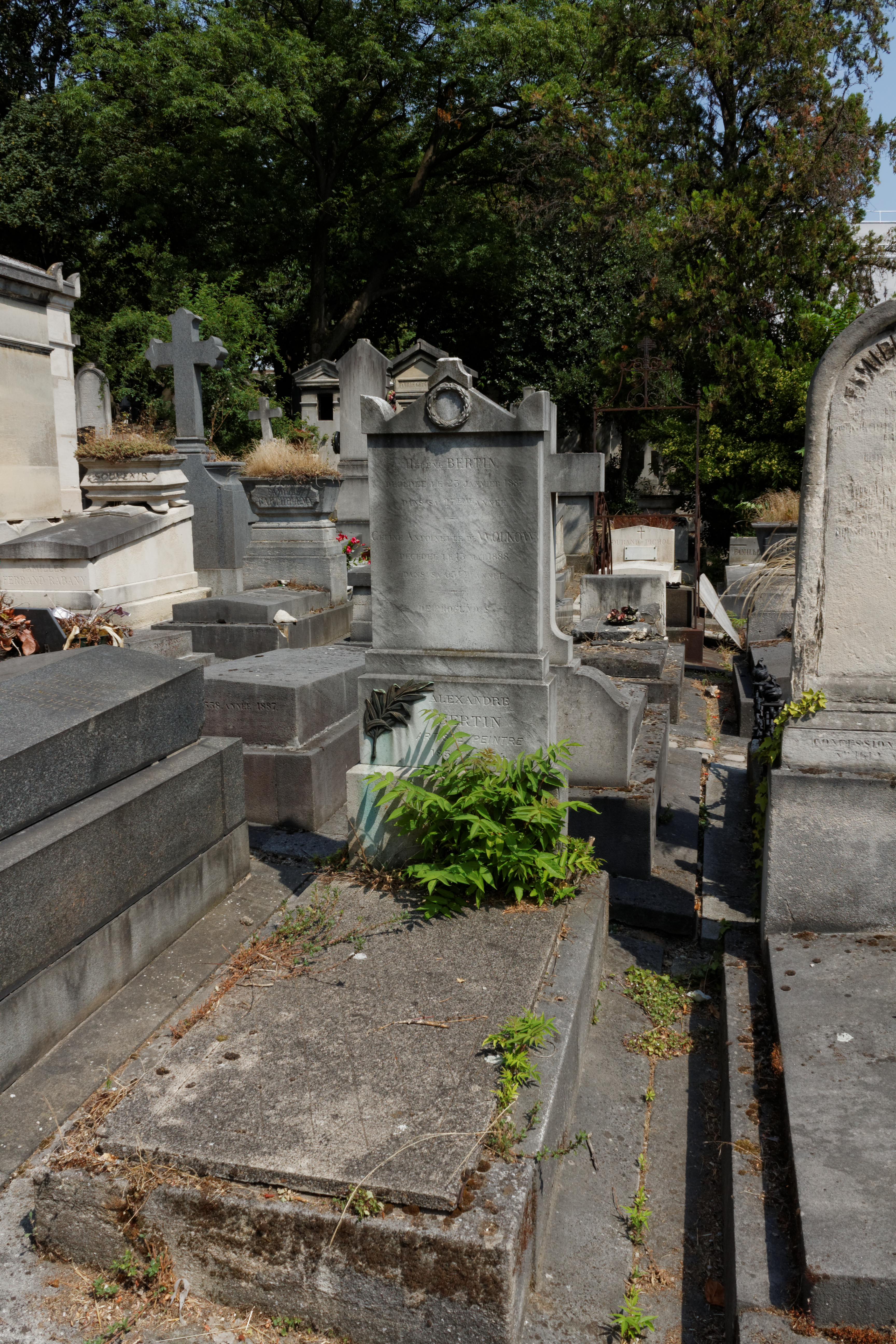 Sépulture d'Alexandre Bertin (1853-1934), peintre naturaliste ; Hélène Bertin née de Wolkow (-1887), sa première femme.